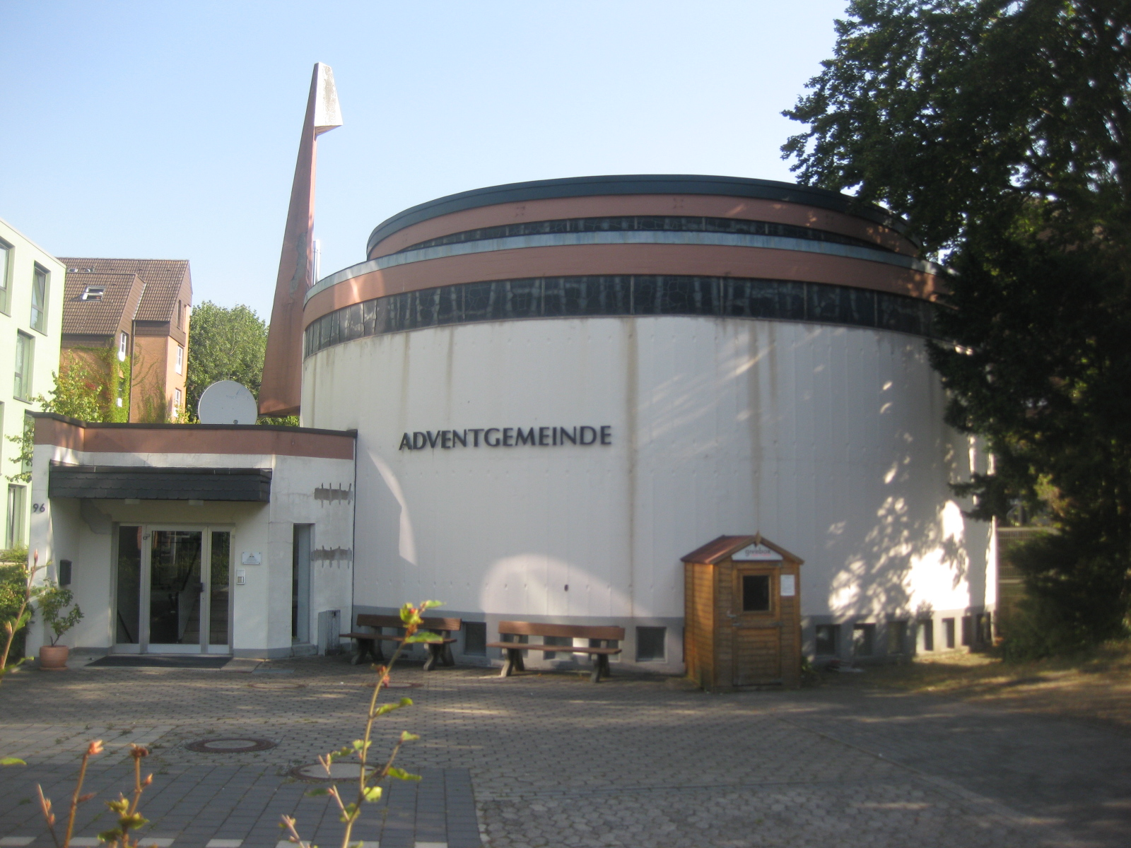 Westdeutsche Nachkriehsmoderne in der Tradition des Brutalismus.Der Wohntrakt wurde abgerissen, die Kirche wird heute von der Adventsgemeine verwendet.